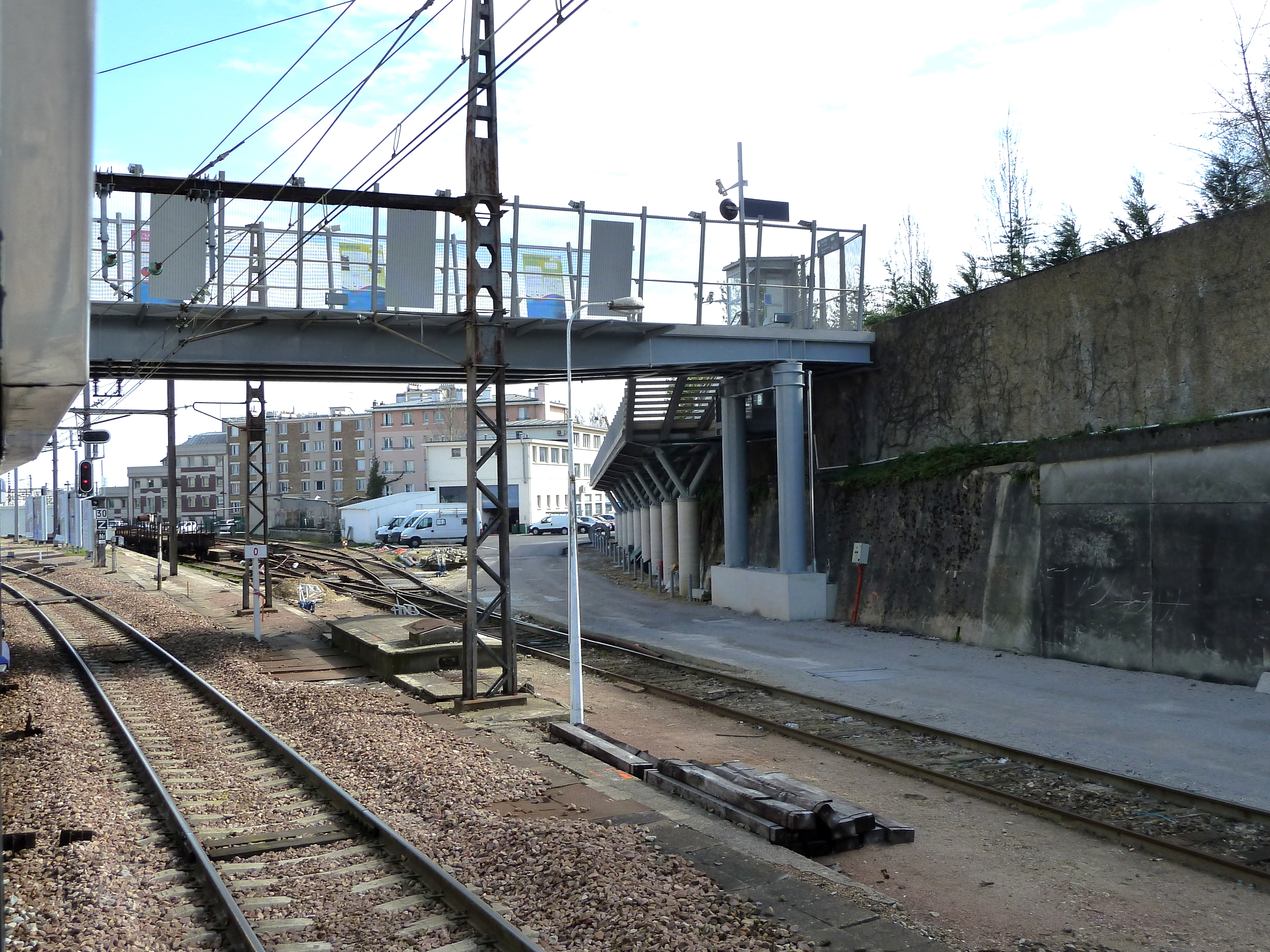 Versailles Chantiers Passerelle depuis les quais